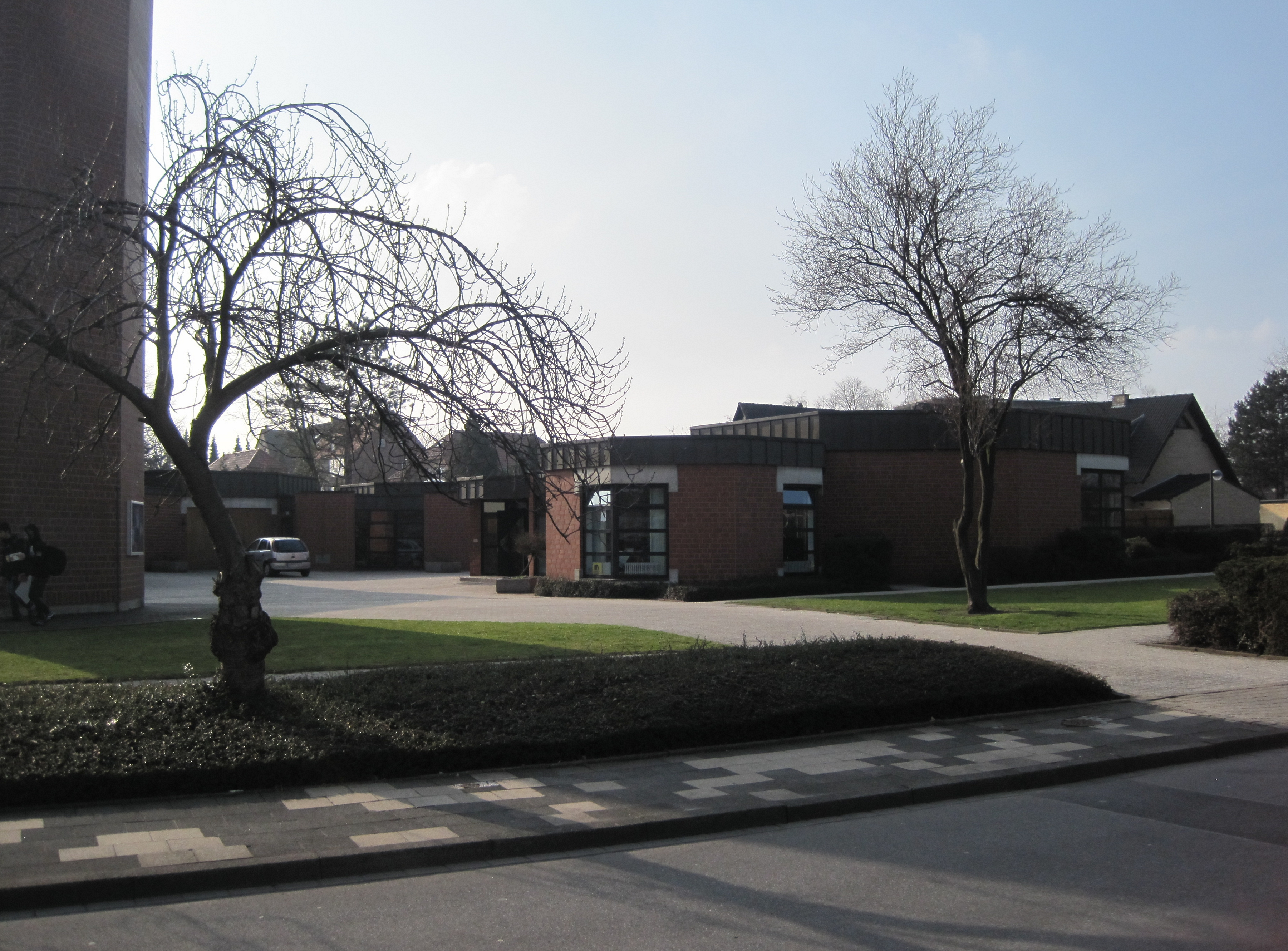 Das Foto zeigt die Christuskirche in Hamm-Bockum-Hövel.